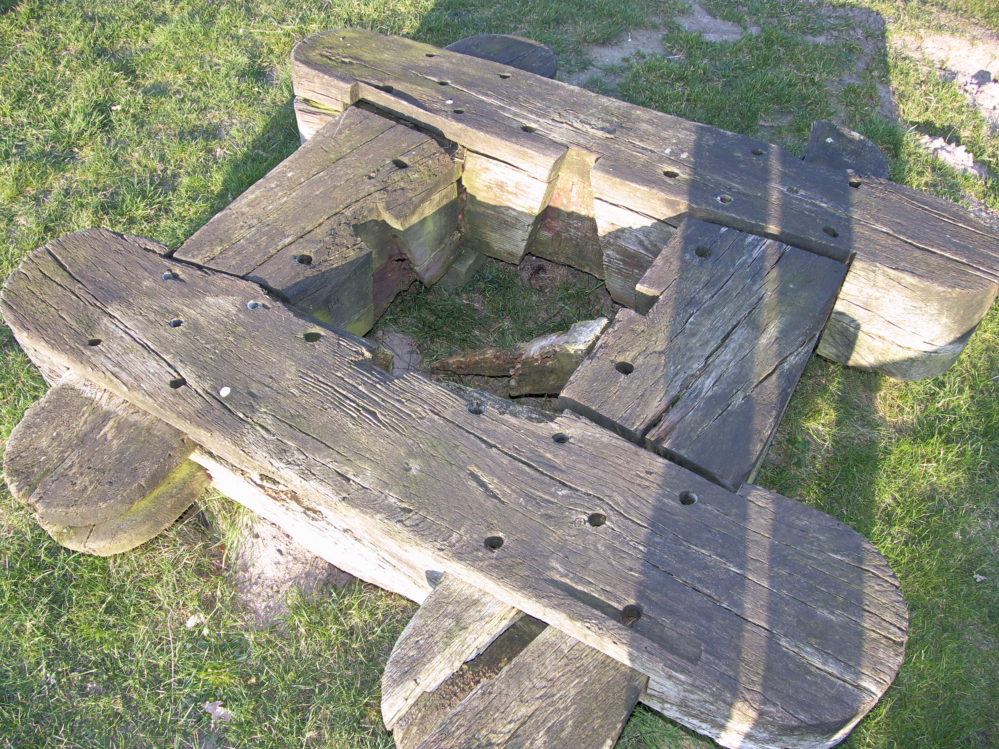 Molen Den Olden Florus, voormalige zetel